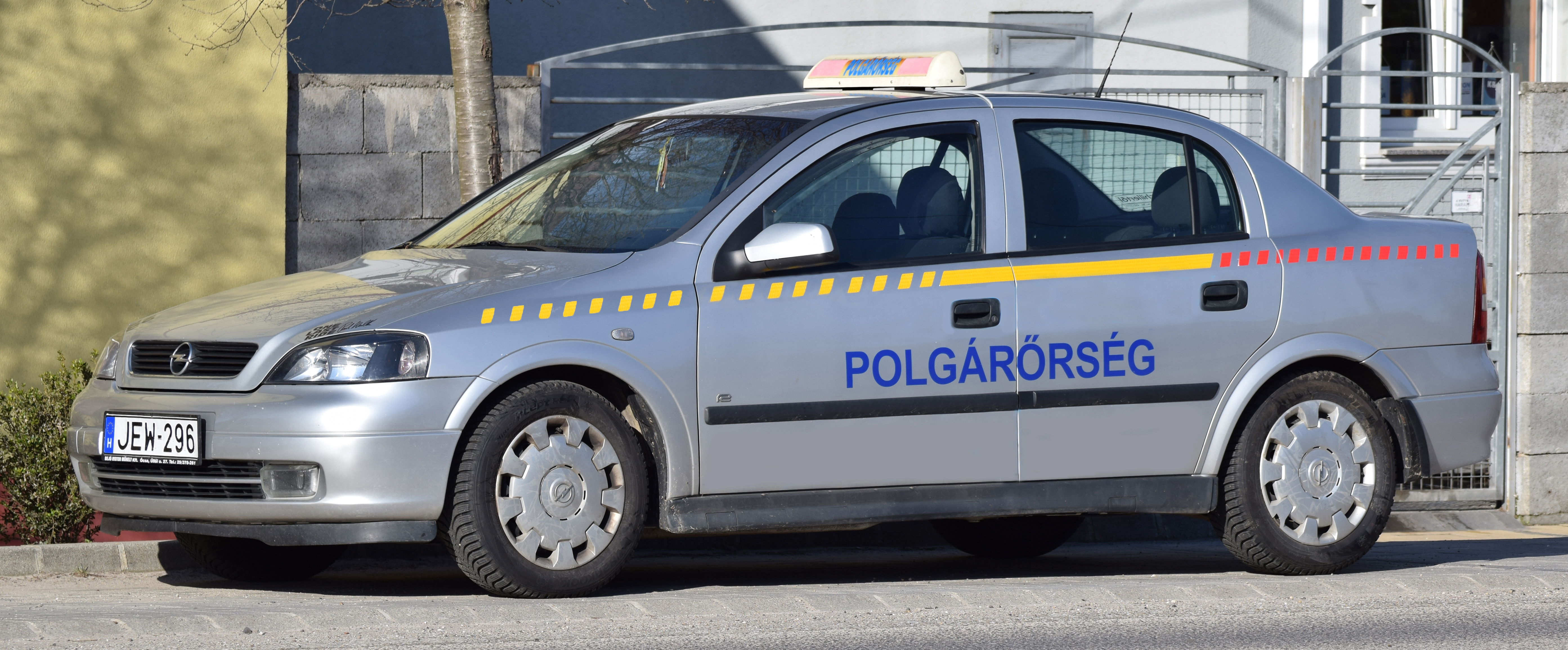 Ócsa Városi Polgár Egyesület gépjárműve